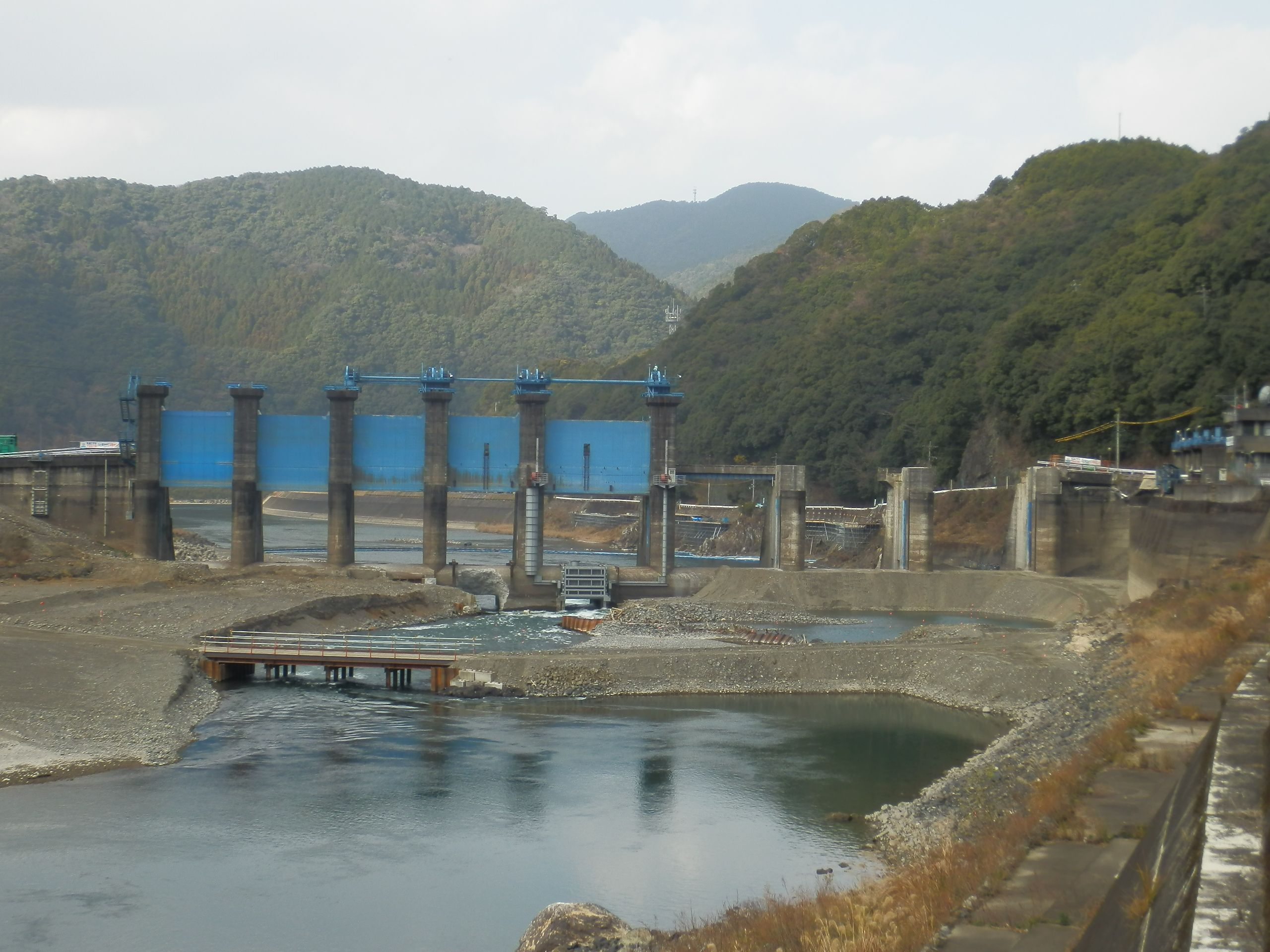 撤去工事中の荒瀬ダム（熊本県・球磨川）2014年1月1日